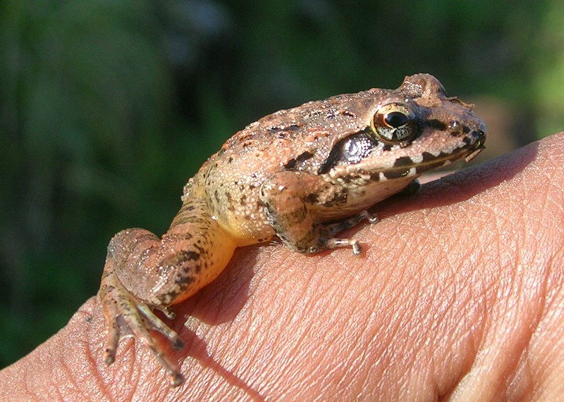 Indirana semipalmata - ID by K V Gururaja. Frog found in Shola at Talakaveri, Coorg, India